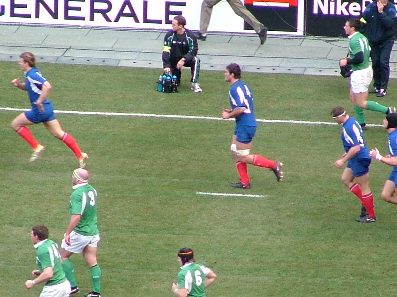 Le XV de France de rugby lors de France-Irlande du tournoi des six nations 2006 au Stade de France